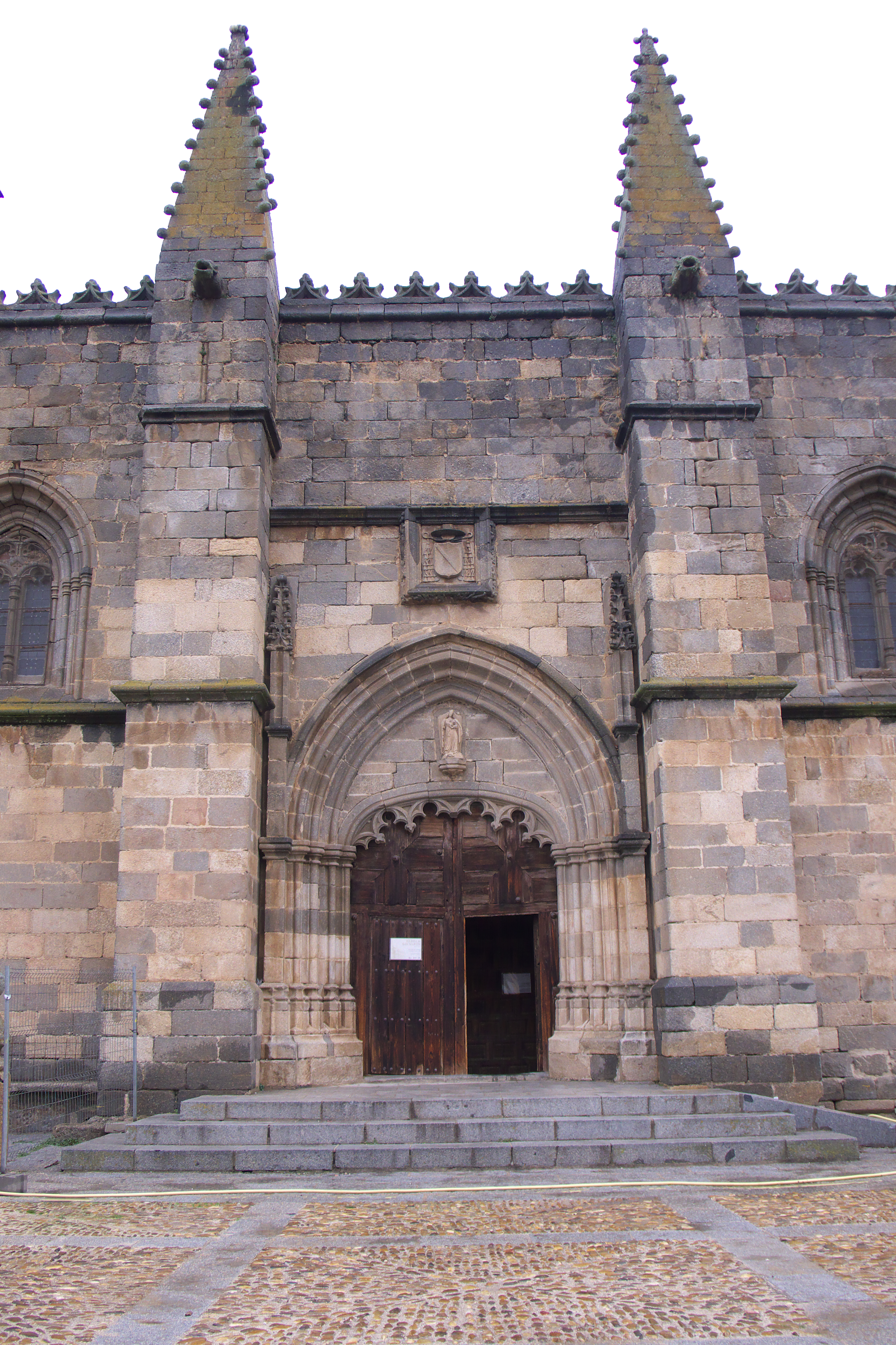 Portada meridional (s. XV) Su promotor, el obispo y cardenal Juan Carvajal (1400-1469). Desconozco la autoría, considerando que este culto obispo, ocupó el obispado de Coria y Plasencia.